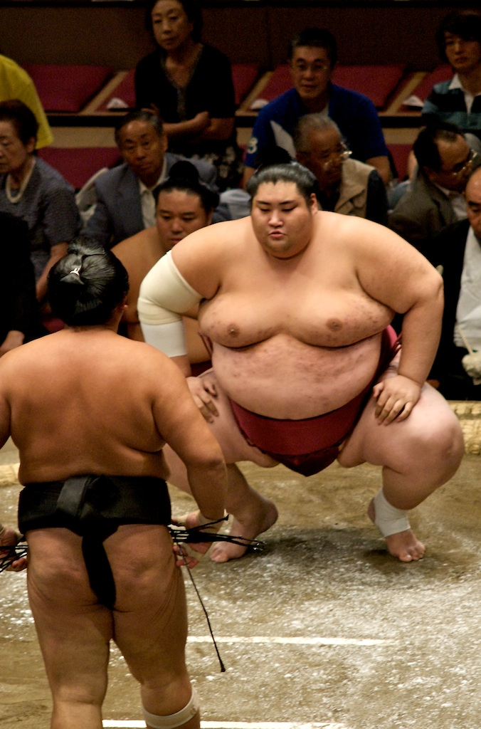 size mismatch